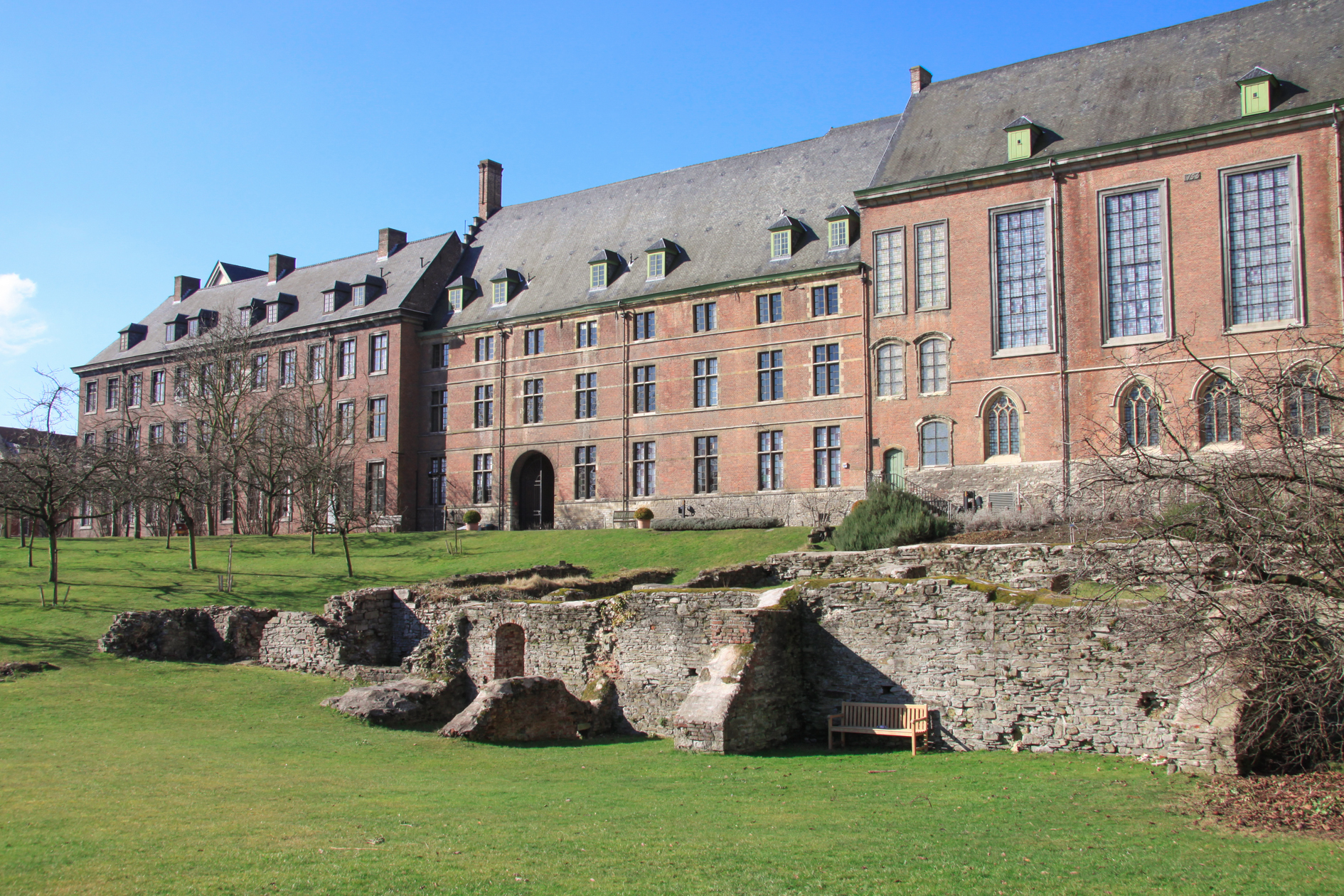 Gent, Sint-Pietersabdij